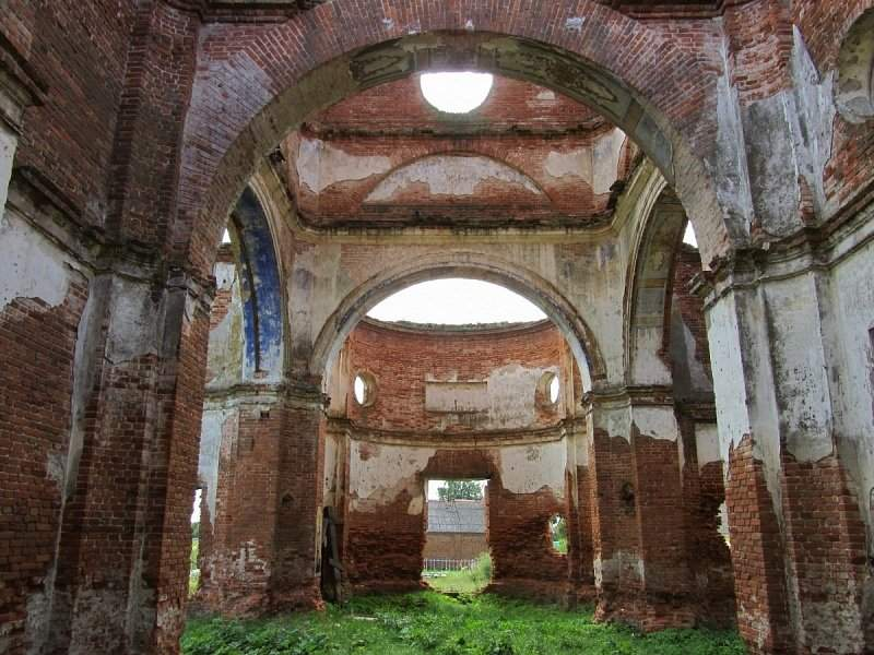 Інтэр'ер Свята-Мікалаеўскай царквы ў вёсцы Леніна Добрушскага раёна Гомельскай вобласці